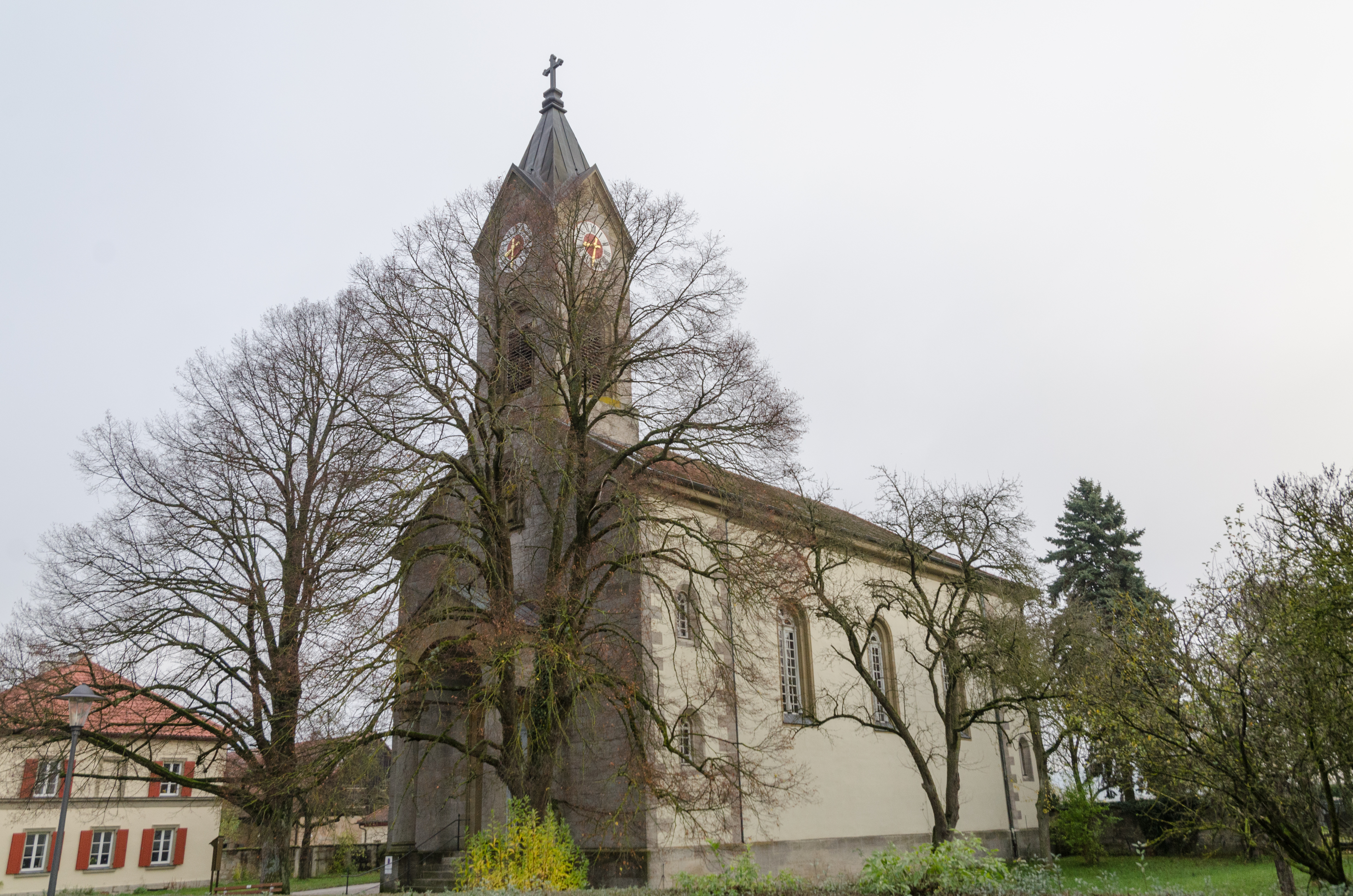 Oberoestheim, Kirchplatz 6